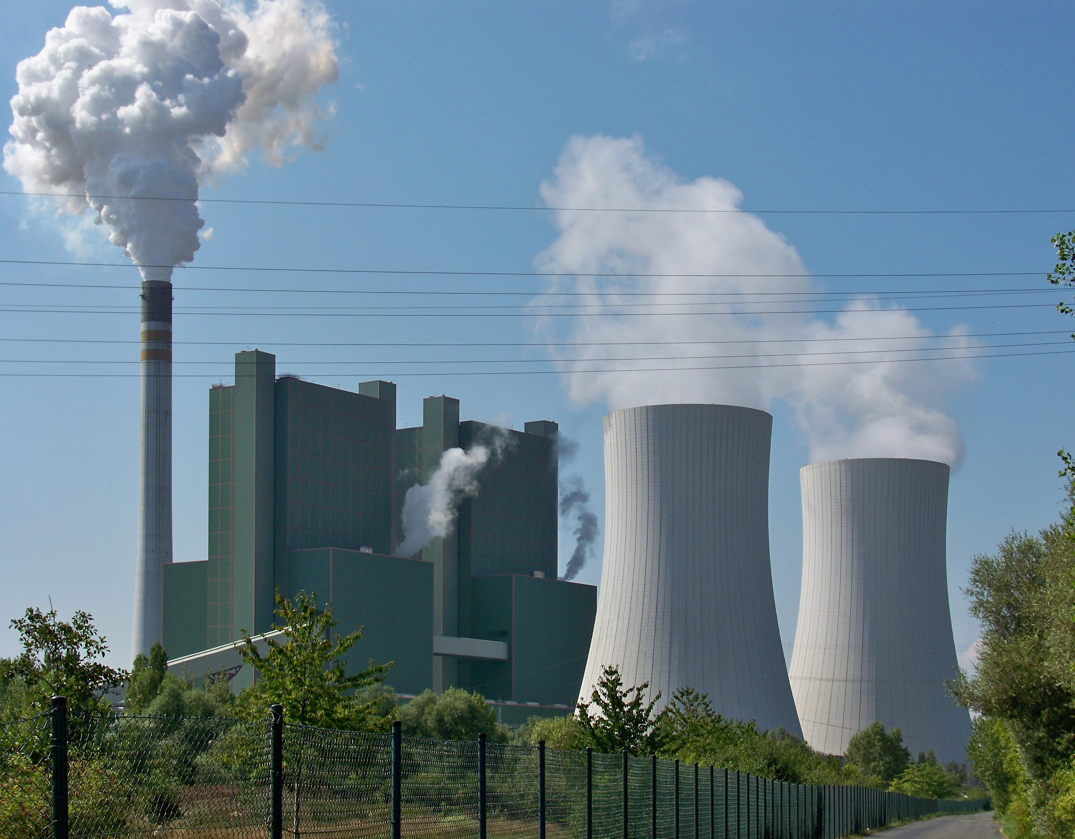 Braunkohlekraftwerk Schkopau der E.ON AG